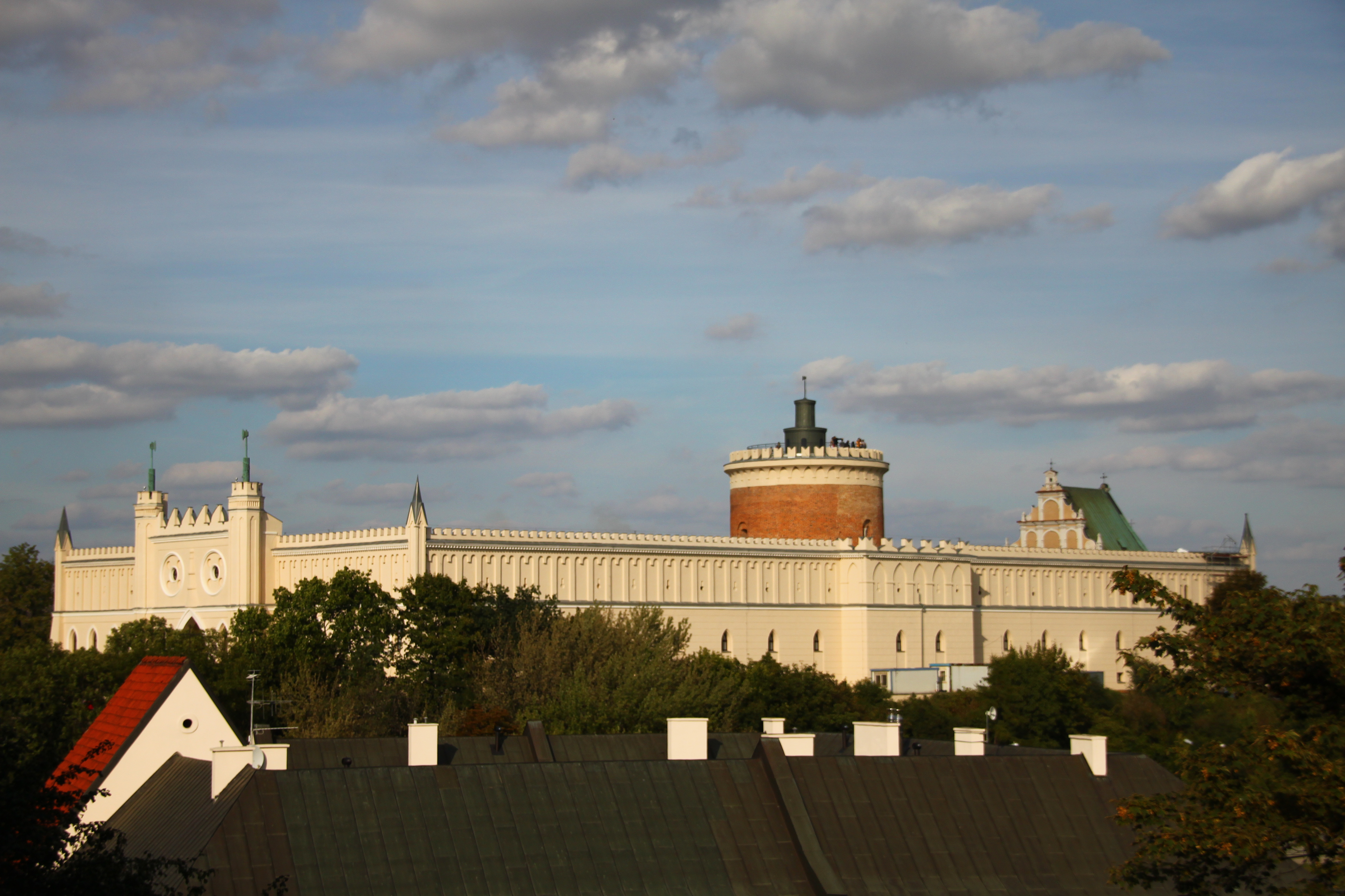 Lublin, zamek